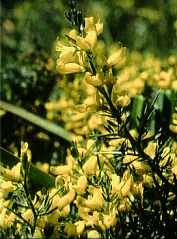 Sicilian botanical endemisms Genista cupanii